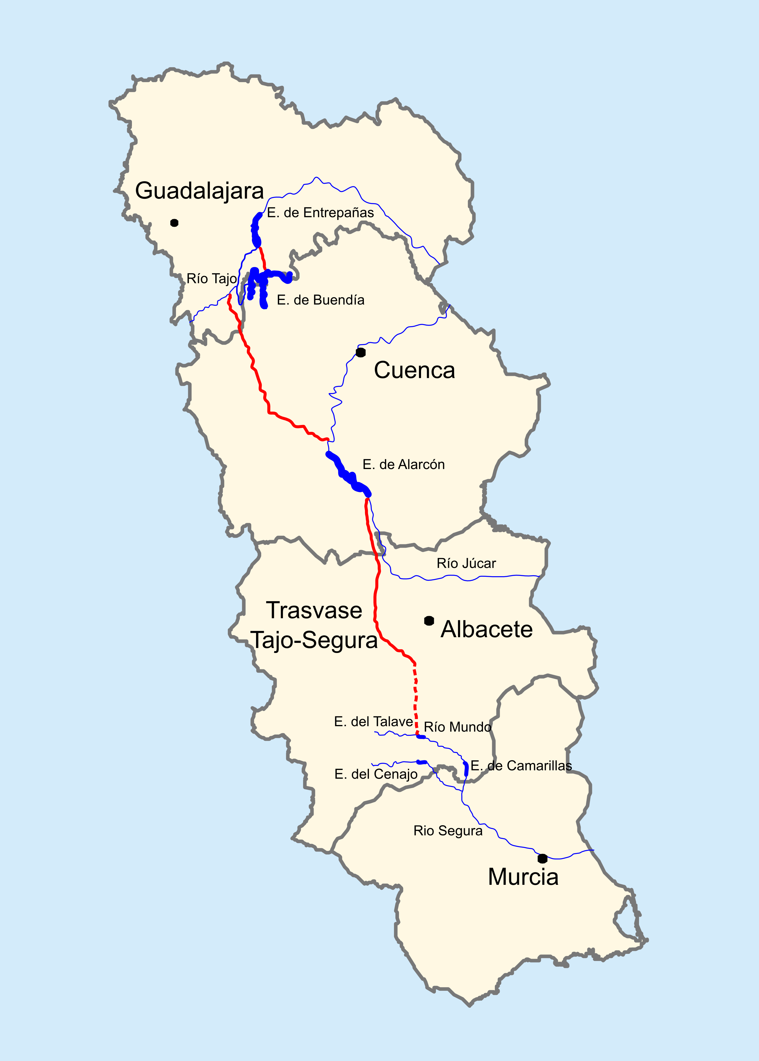 Trasvase Tajo-Segura a su paso por las provincias de Guadalajara, Cuenca, Albacete y Murcia v1.0 raster.